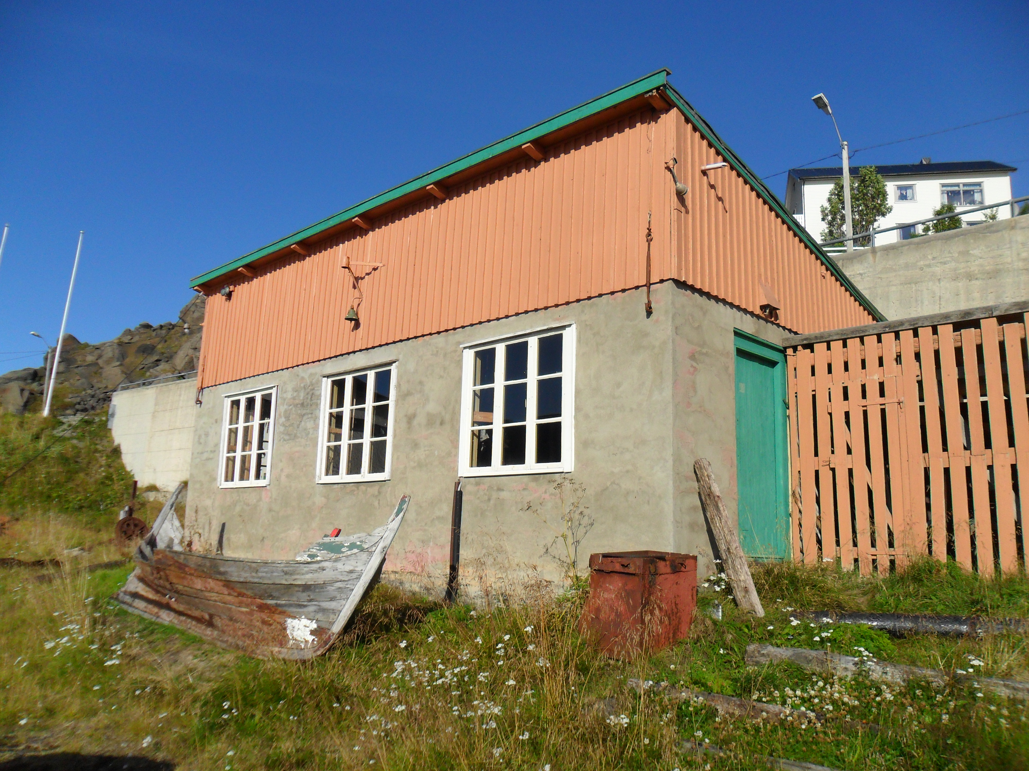 Fra Storbukt i Nordkapp kommune, Finnmark